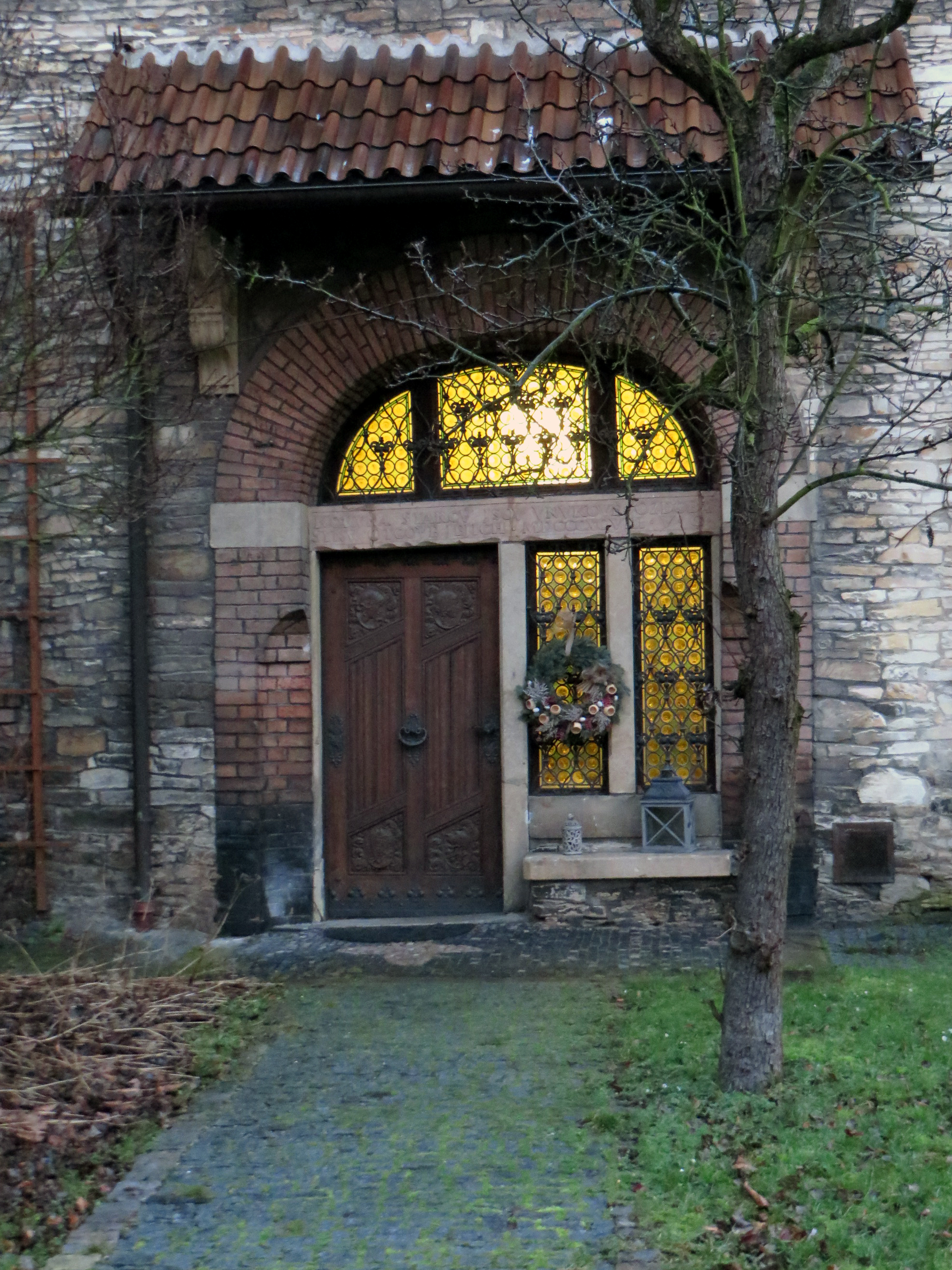 Obereignerova vila v Poděbradech. Vchod do domu.